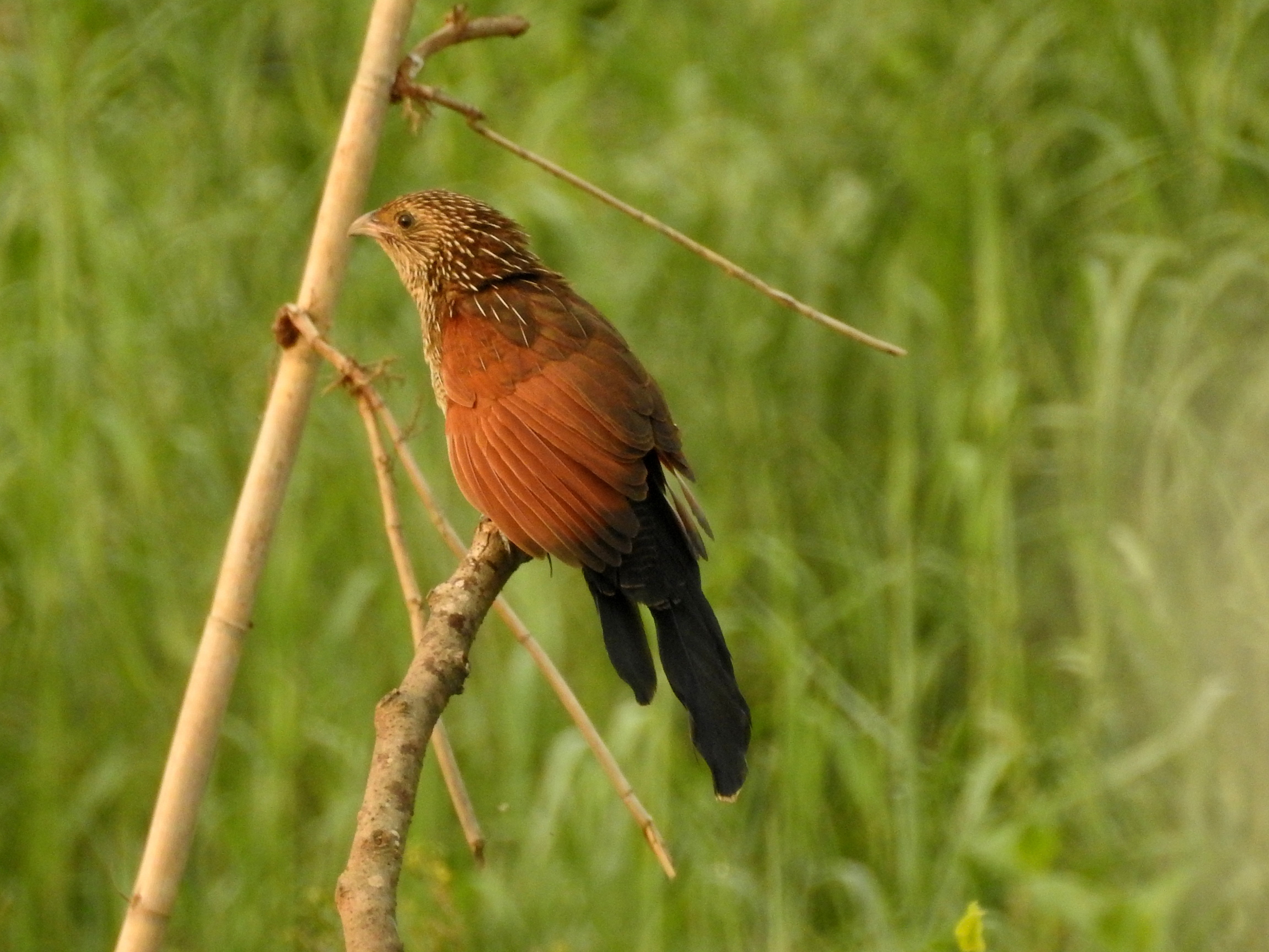 Lesser coucal പുല്ലുപ്പൻ from Kole Wetlands